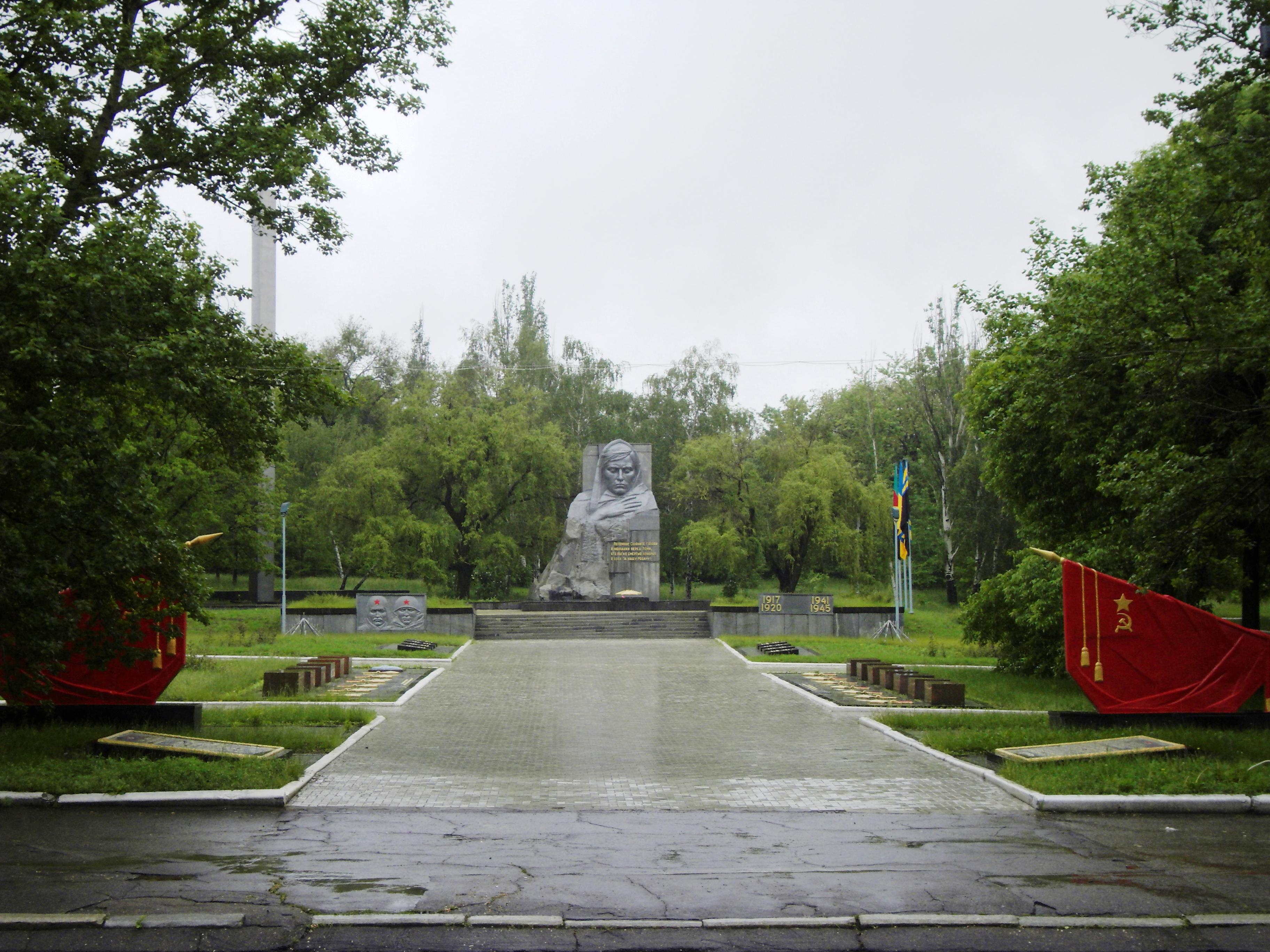 Меморіальний комплекс "Слава", Дзержинськ